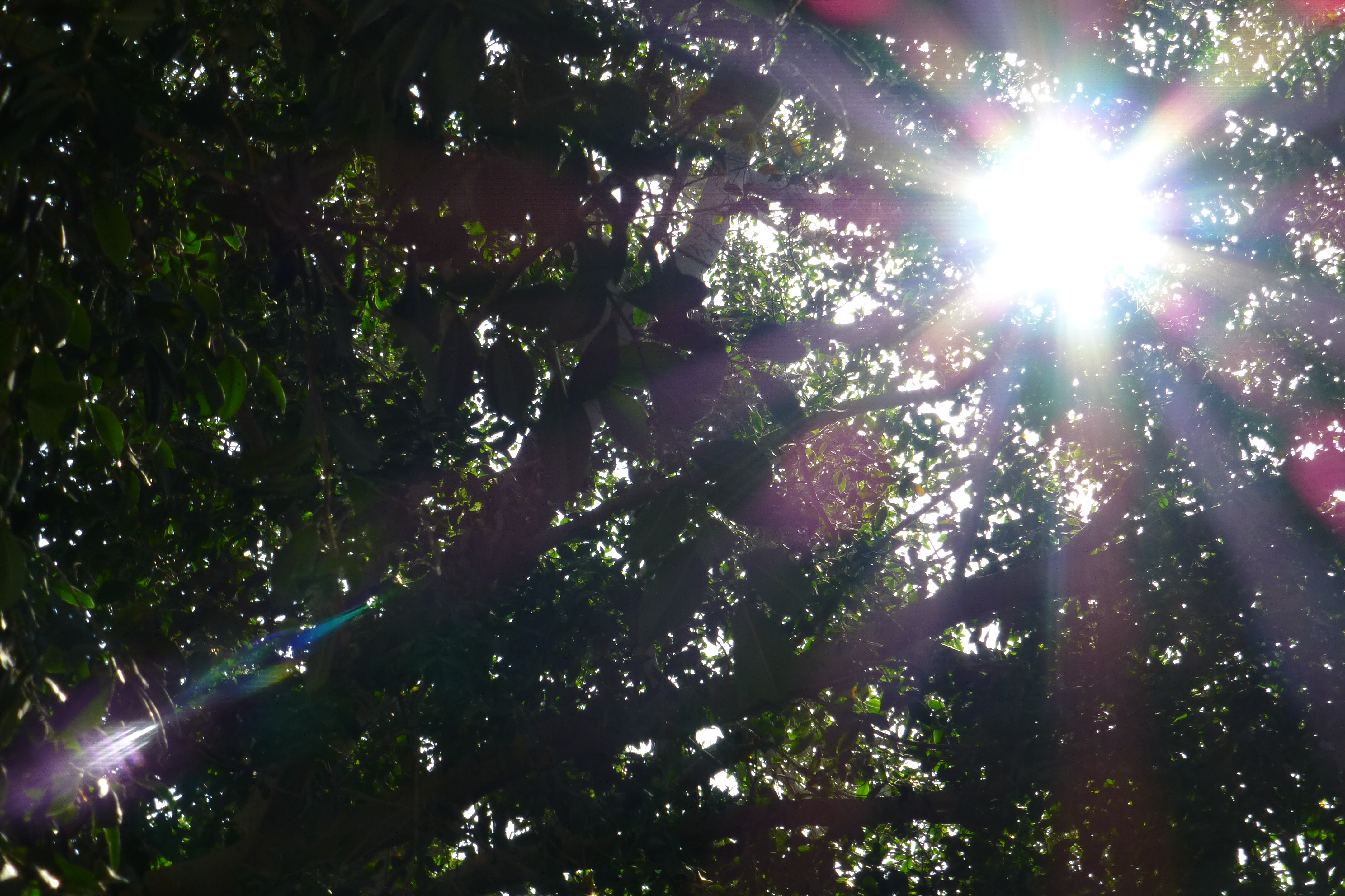 גן אלנבי - רח' יפה נוף 120, מרכז הכרמל, חיפה